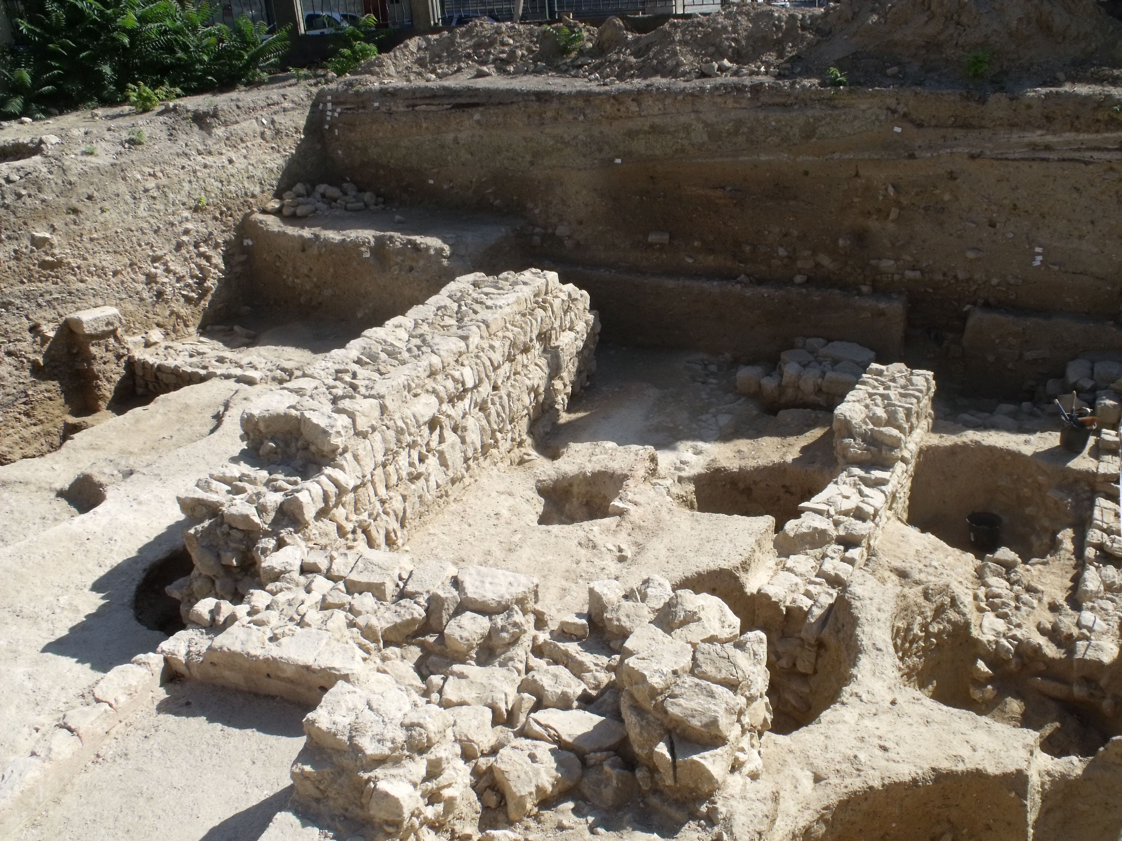 Fouilles de septembre-octobre 2010 dans le secteur sud-ouest de l'ancienne ville des Tours (Aix-en-Provence). Vue générale du site.